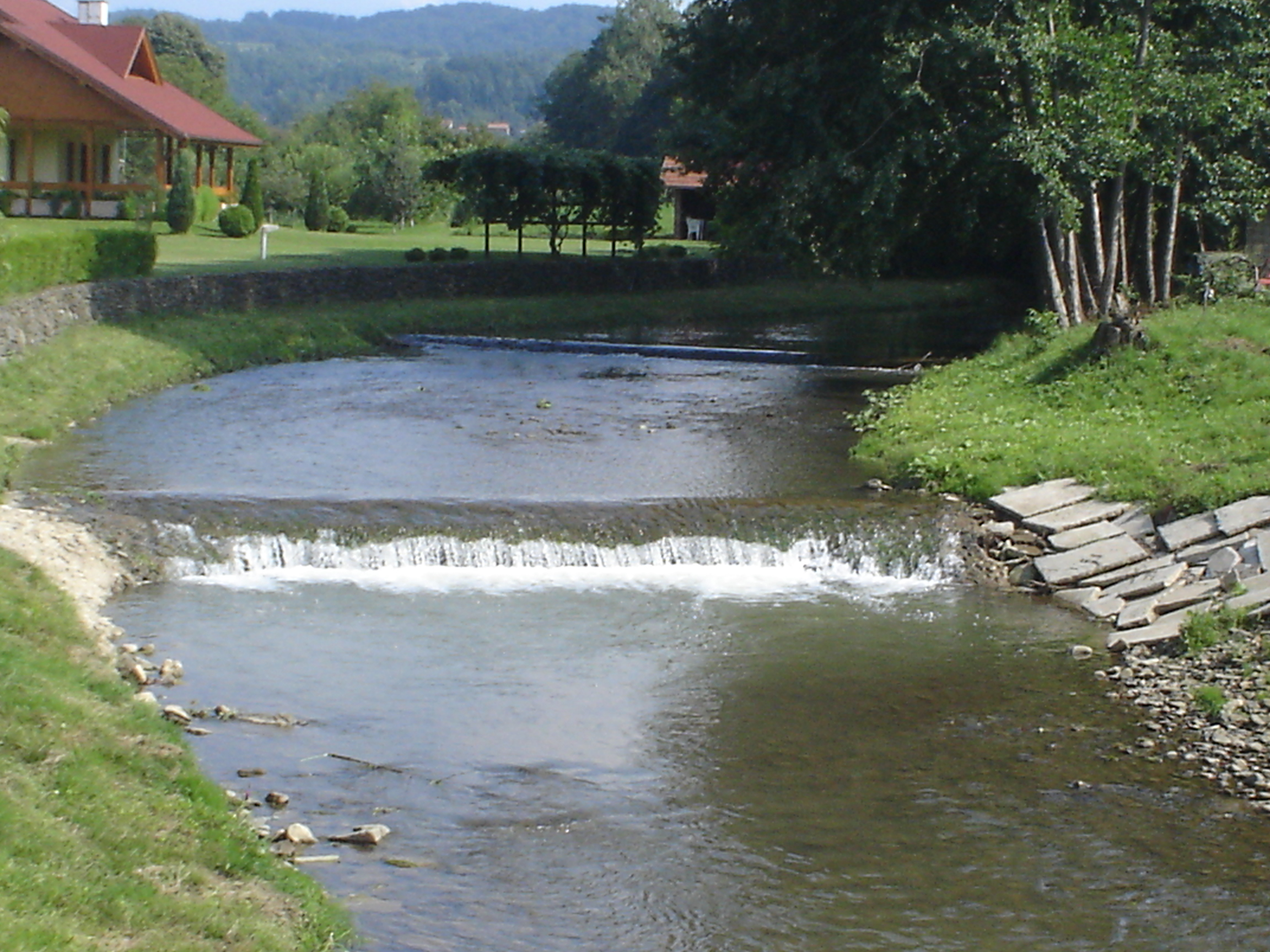 сам сам сликао